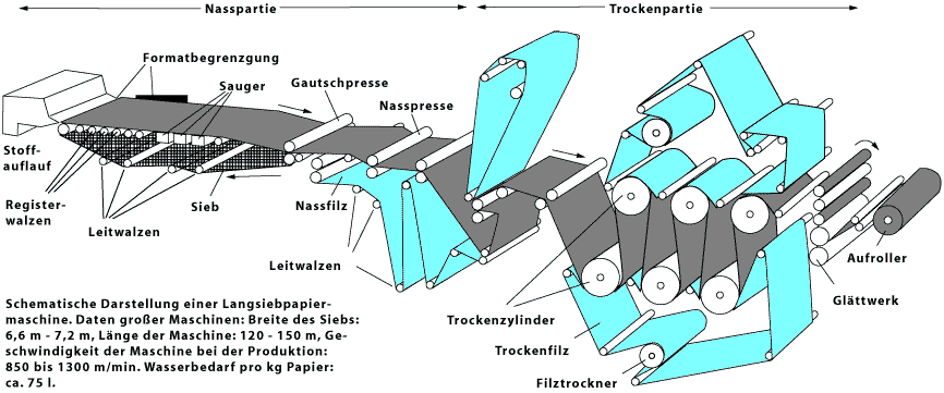 Langsiebpapiermaschine Schema, GNU FDL, freie Lizenz, verwende ich auch auf eigenen Webseiten, selbsterstelltes Bild